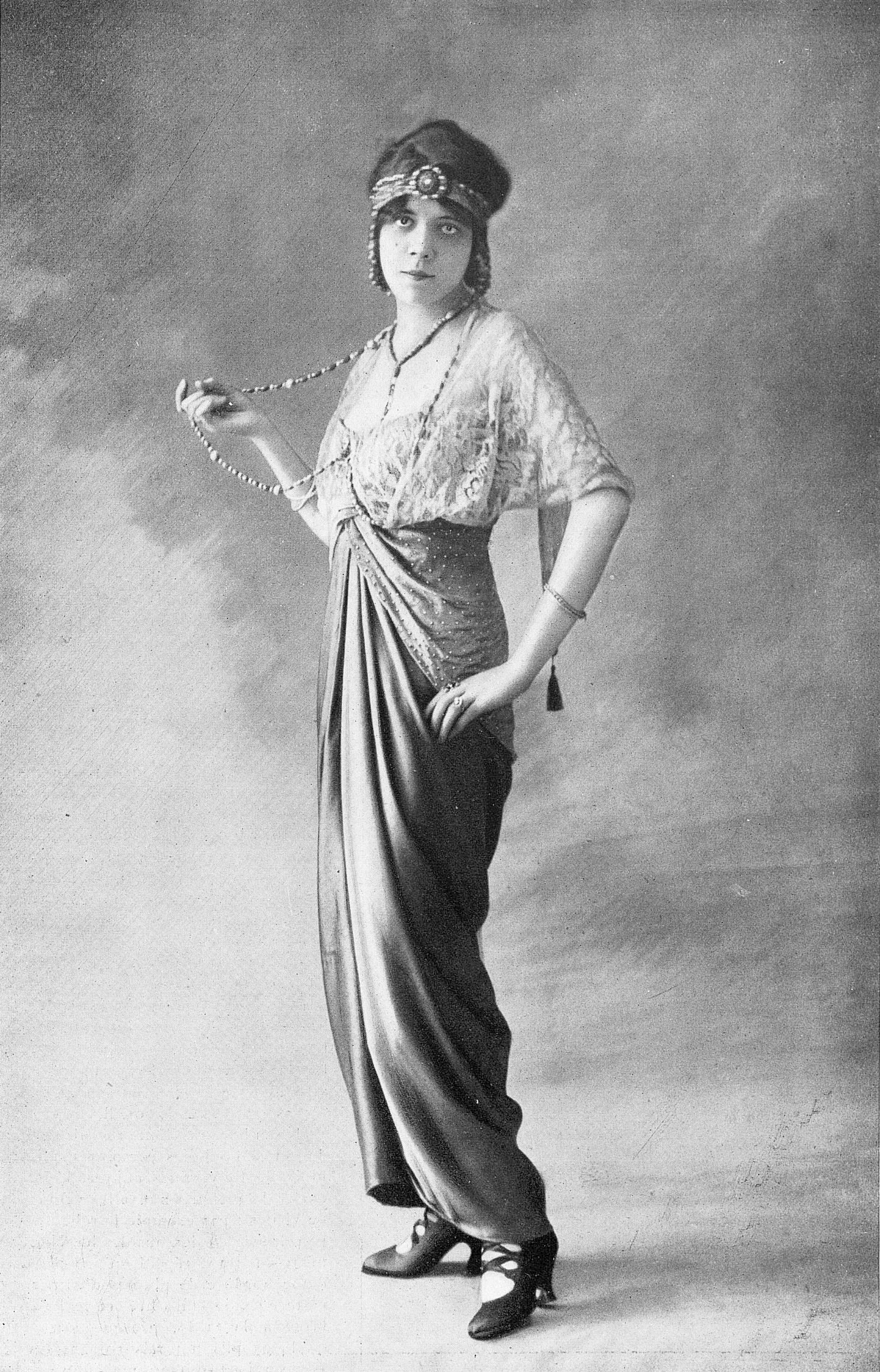 "Jupe en crêpe satin tango drapée sous une haute ceinture de velours diamanté. Corsage fait d'une écharpe de dentelle d'argent". Photograph from Les Modes : Revue mensuelle illustrée des arts décoratifs appliqués à la femme.